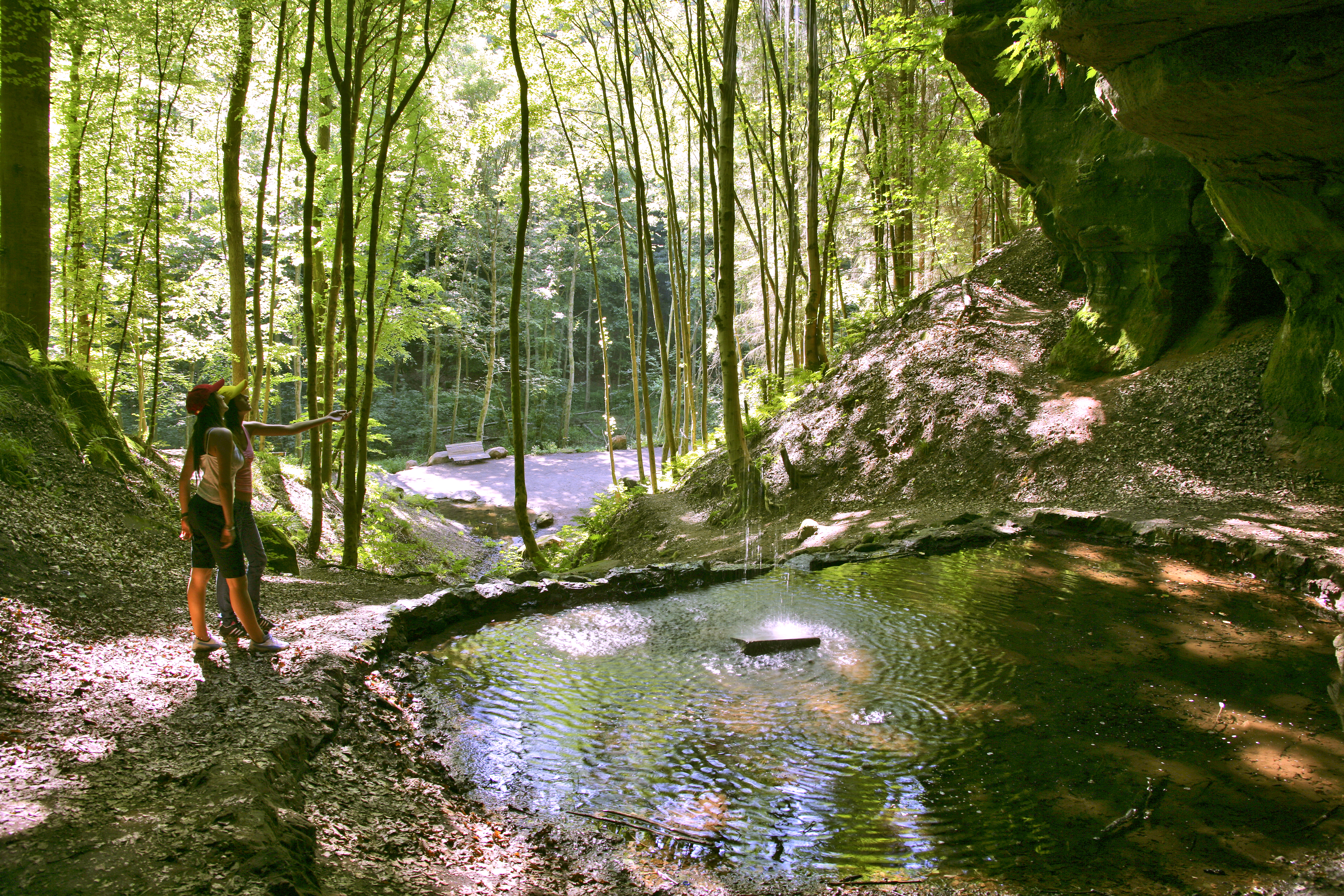 Bärenhöhle - Quellwasser